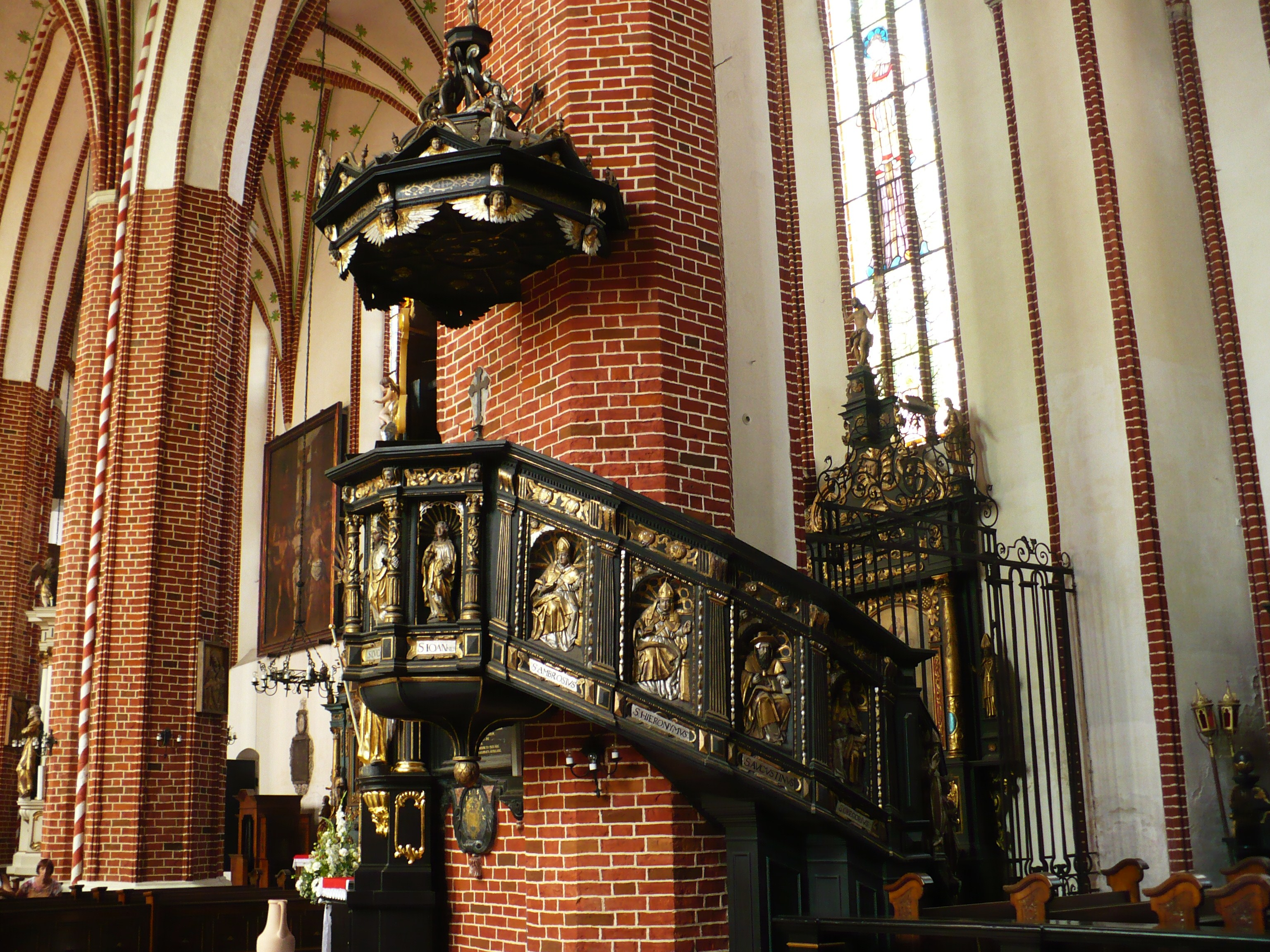 Chełmża, kościół katedralny pw. Św. Trójcy, 2 poł. XIII-XVII